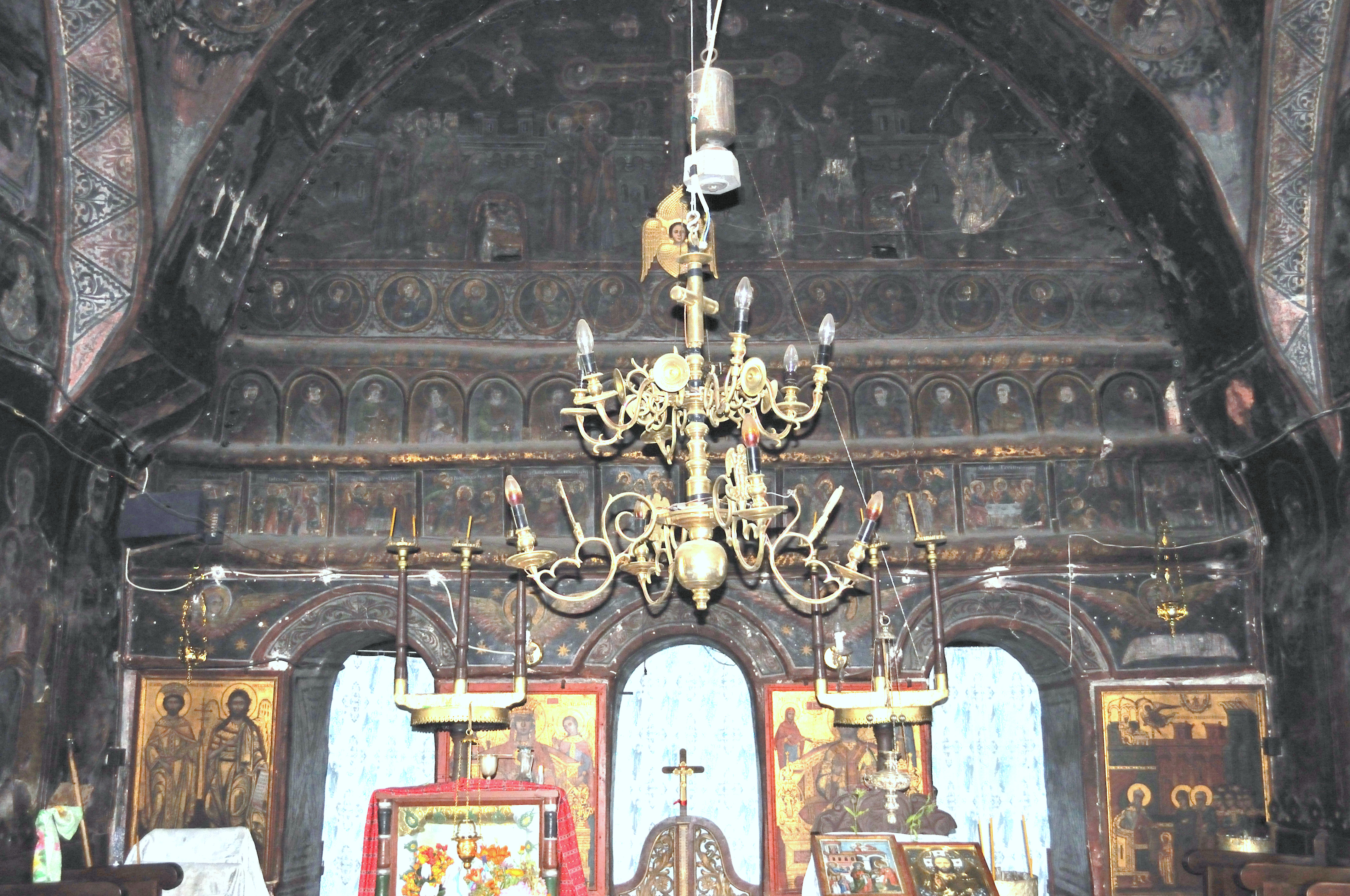 Biserica „Intrarea în Biserică a Maicii Domnului” sat Bărbătești, cătun Mierlești, județul Vâlcea